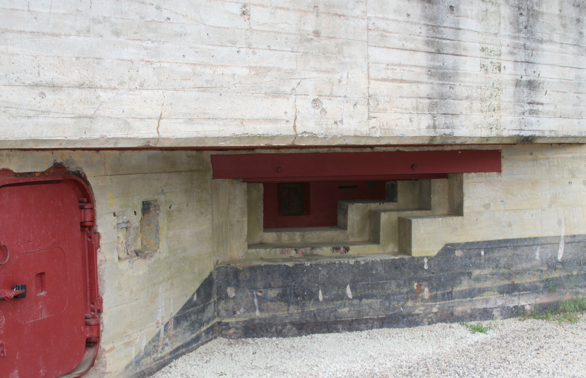 B-Werk Besseringen Flankierungsanlage 7P7 Treppenscharte